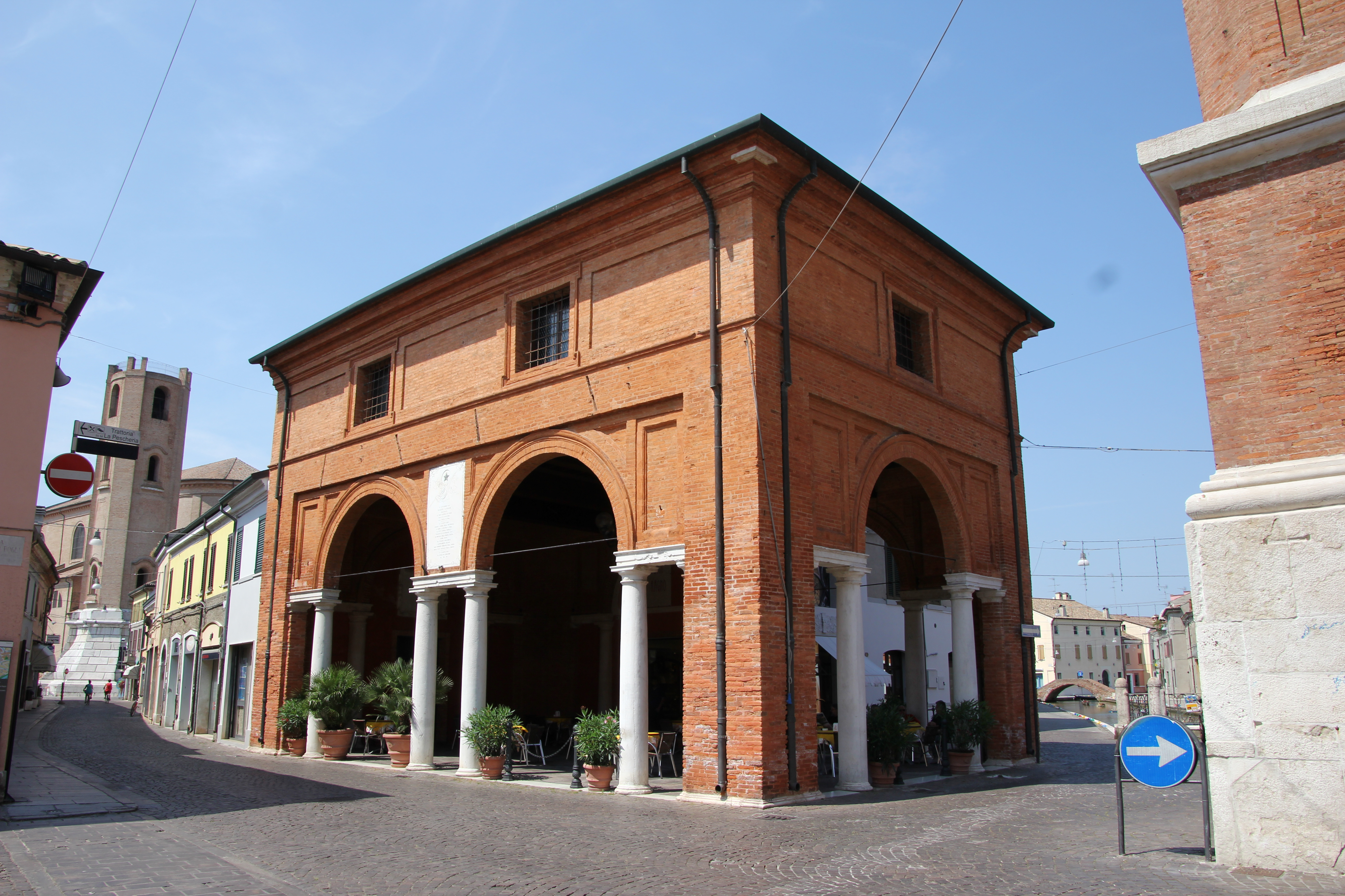 Comacchio, loggia dei Mercanti del grano